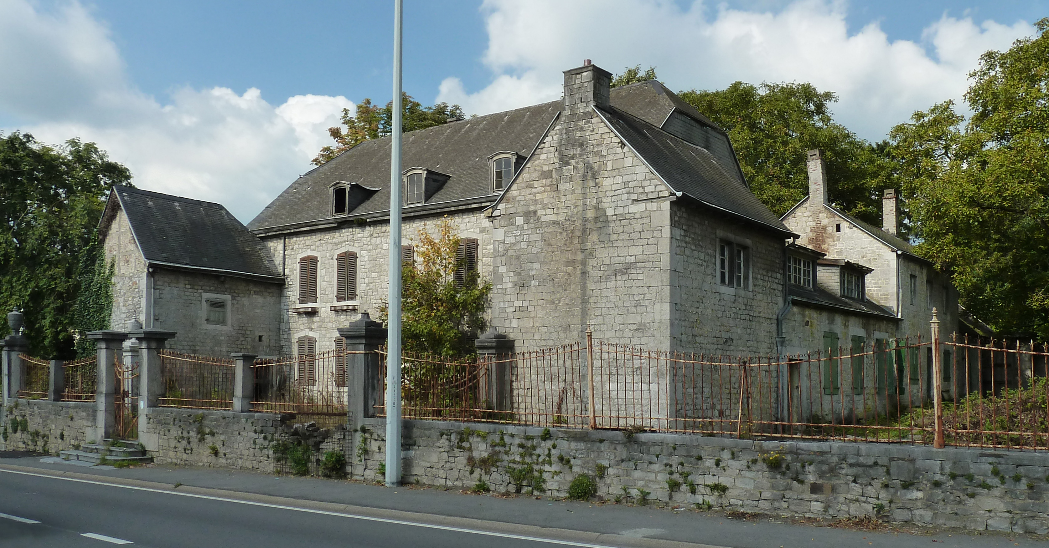 Eupener Strasse 8, Eynatten, Raeren, België